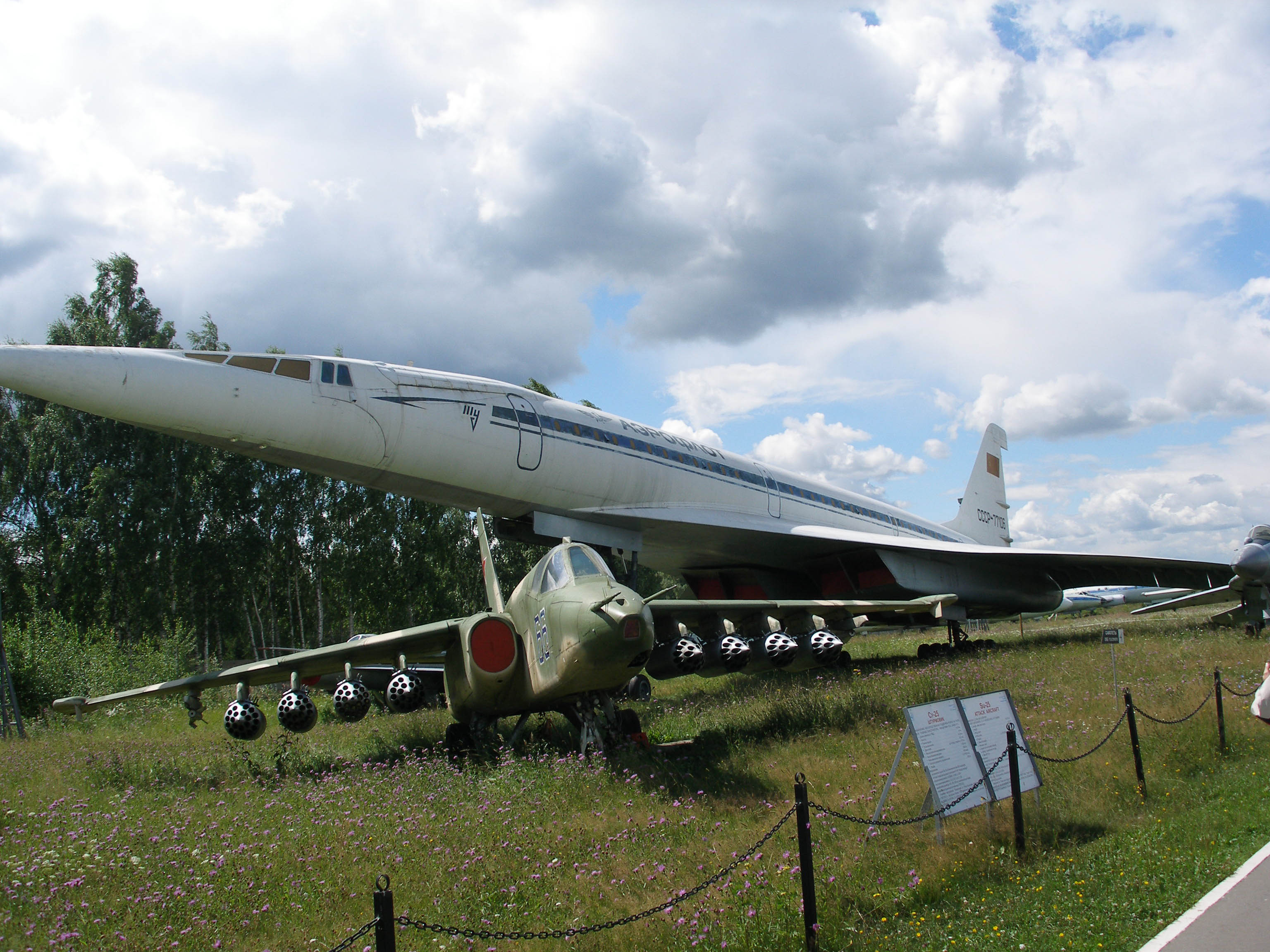 Ту-144 и Су-25 в Монино